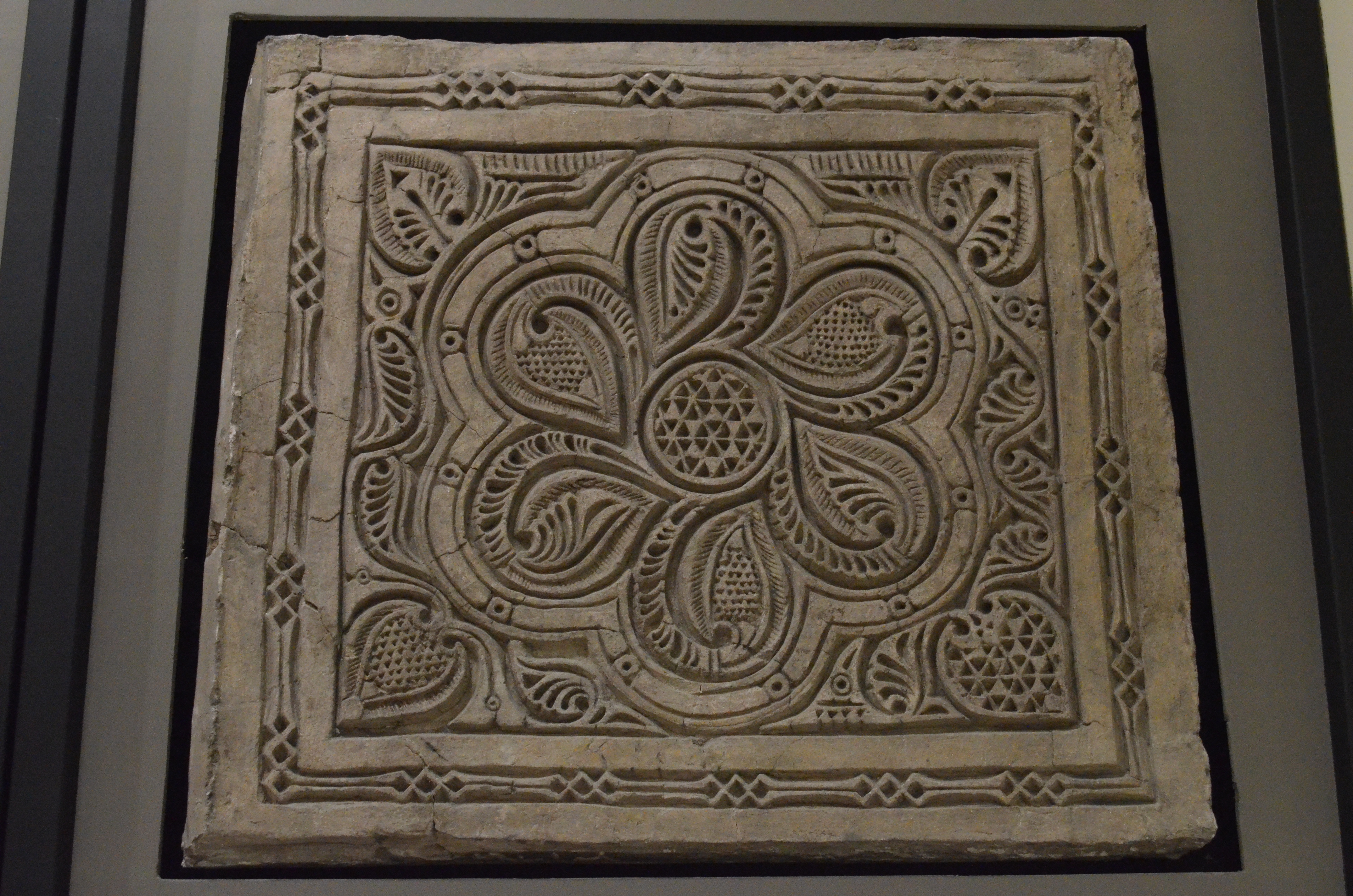 موزهٔ دوران اسلامی